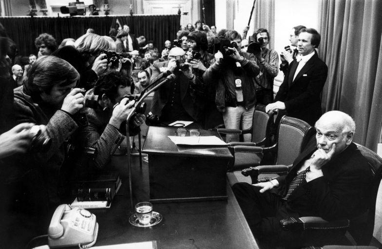 Den Uyl en de val van het Kabinet 22-3-1977